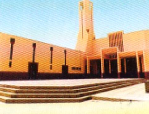 iglesia catedral de huacho